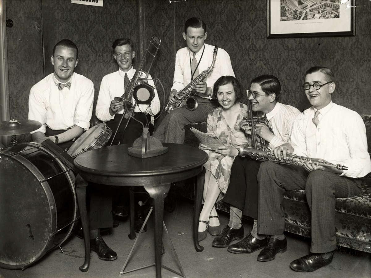 De PHOHI zender: Philips Omroep Holland Indië. De Philipsband uit Eindhoven bij een optreden voor de PHOHI-zender. Vijf instrumentalisten en een zangeres. Huizen, Nederland, 1928.